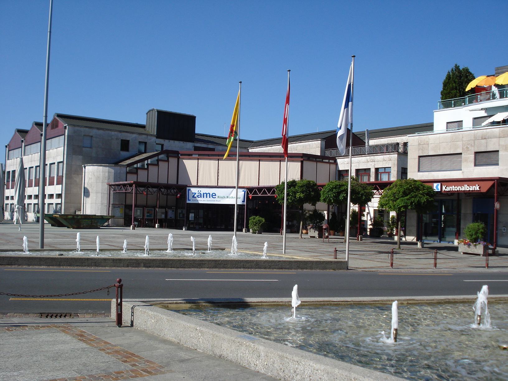 Zentrum Dorfmatt mit Rathaus, Dorfmattsaal, Post und Zuger Kantonalbank